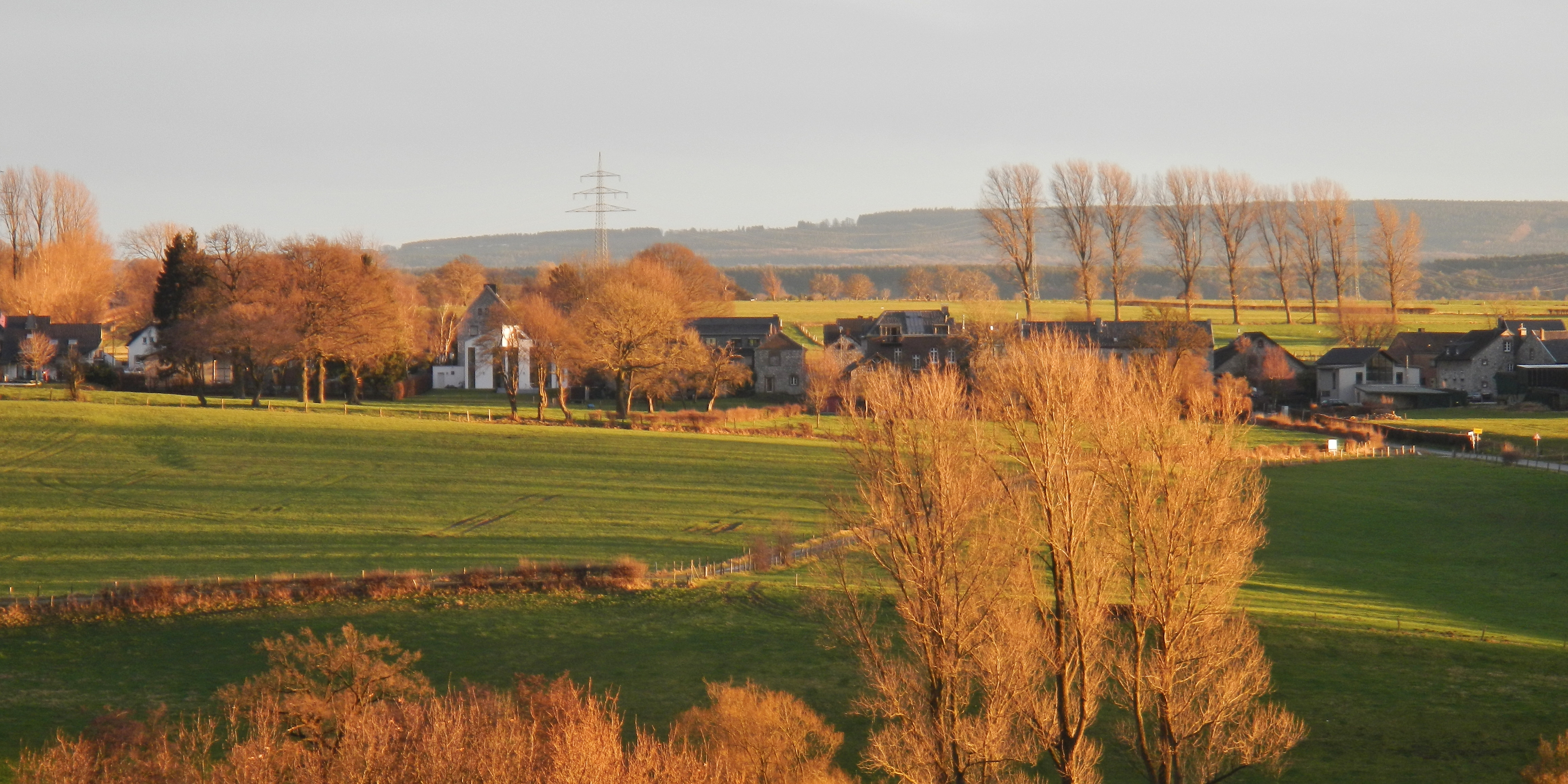 Blick Richtung Krauthausen